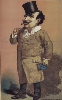 O poeta Gomes Leal caricaturado por Rafael Bordalo Pinheirotitle QS:P1476,pt:"O poeta Gomes Leal caricaturado por Rafael Bordalo Pinheiro" label QS:Lpt,"O poeta Gomes Leal caricaturado por Rafael Bordalo Pinheiro"